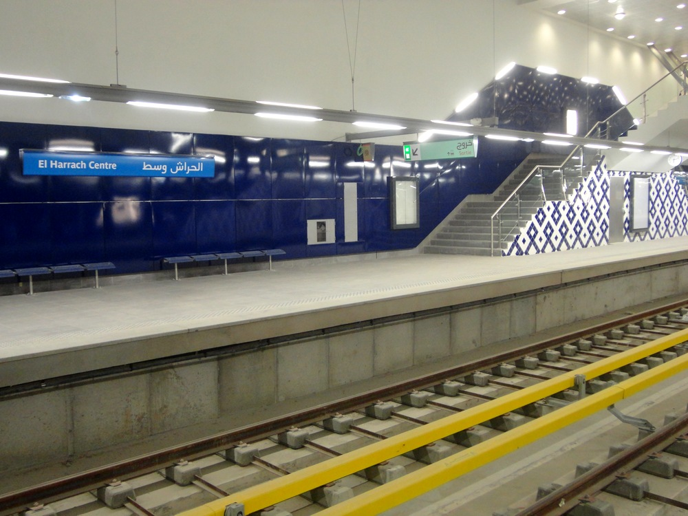 Metro d'Alger, station El Harrach Centre